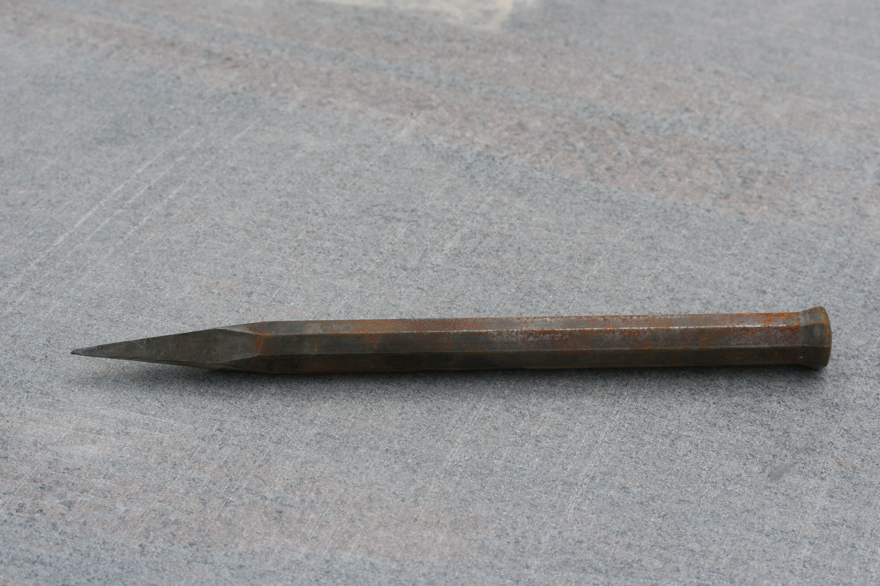 Spitzeisen